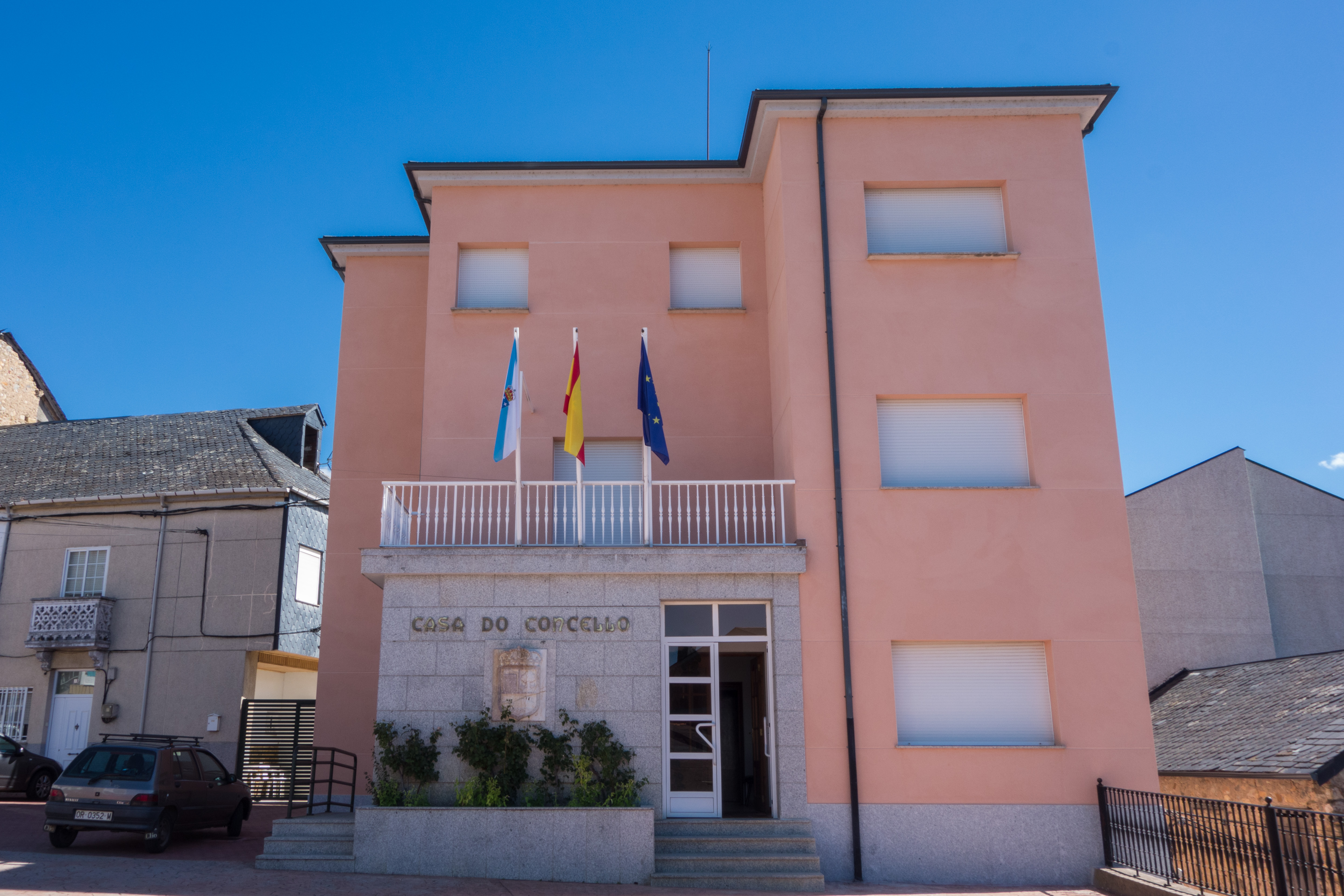 Casa do concello de Rubiá, provincia de Ourense.